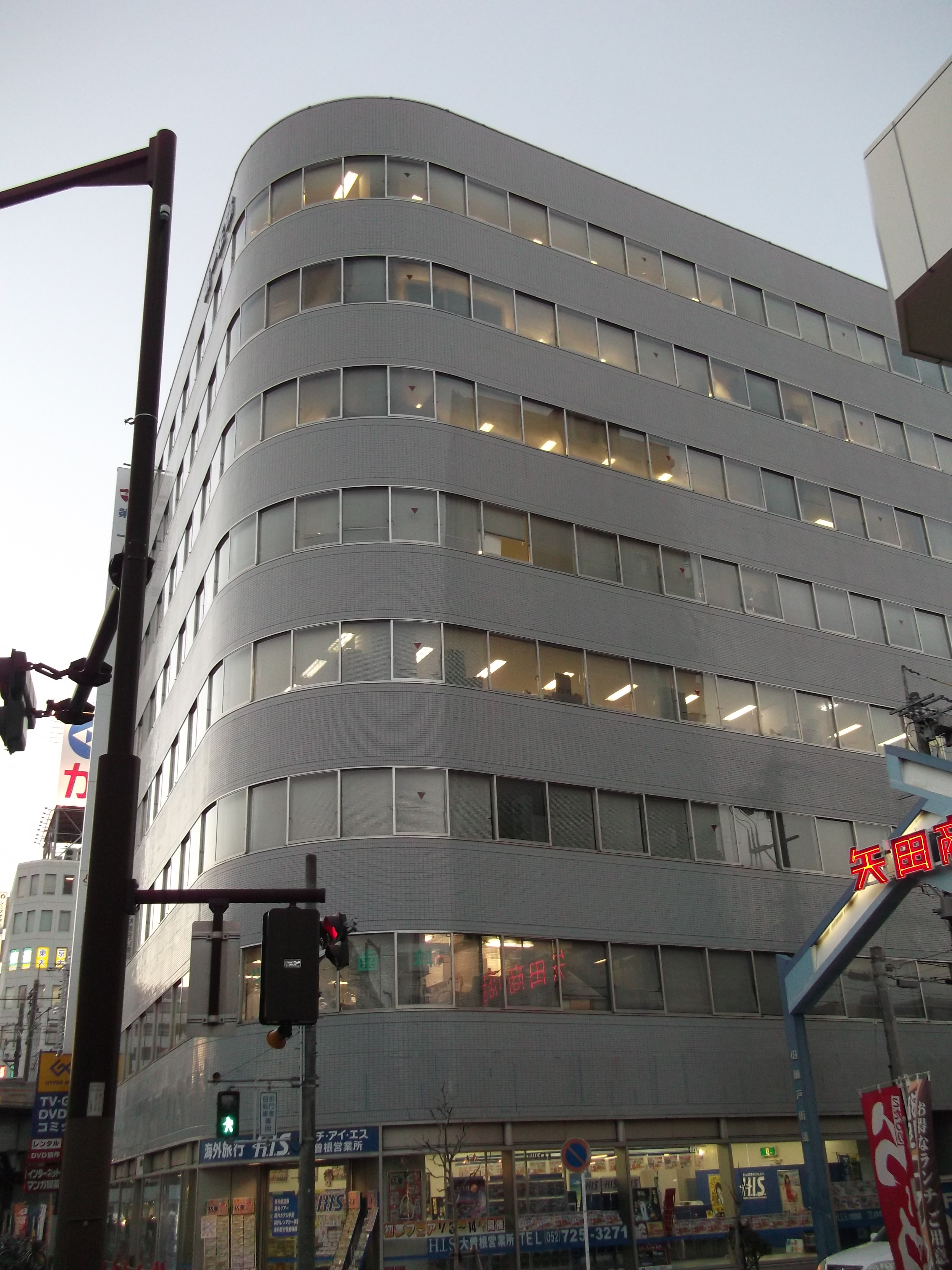 名古屋市東区矢田の名古屋大曽根第一生命ビルを東側より撮影